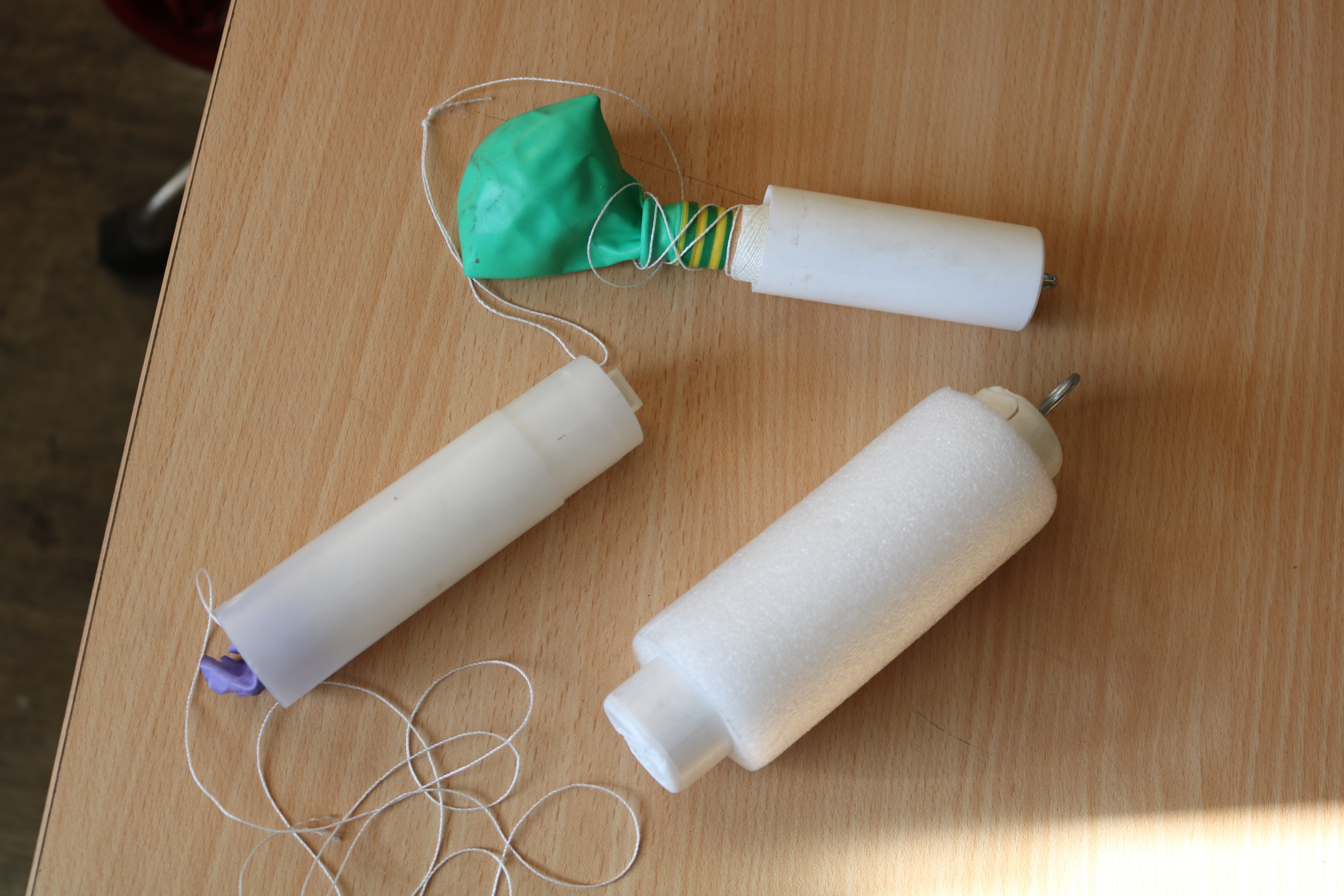 در این نخ بازکن ها سرعت بازشدن نخ رادیوسوند توسط بادکنک تحت کنترل قرار می گیرد. در اثر برخورد نخ هنگام بازشدن به بادکنک، سرعت باز شدن کاهش یافته و از باز شدن ناگهانی نخ که می تواند منجر به برحورد رادیوسوند به زمین یا موانع در آغاز رها نمودن بالون شود، جلوگیری به عمل می آید.